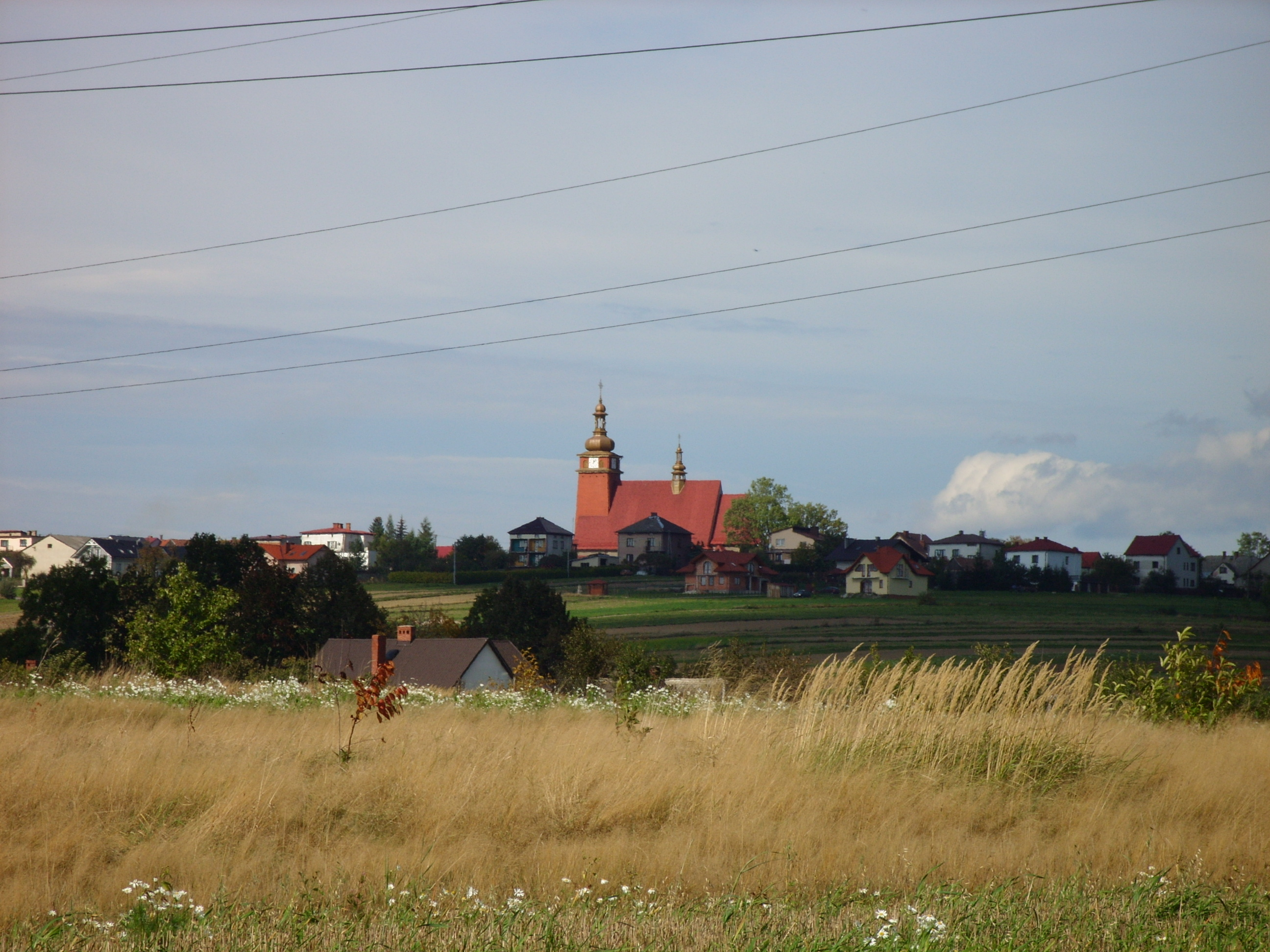 Pietrzykowice- kościół